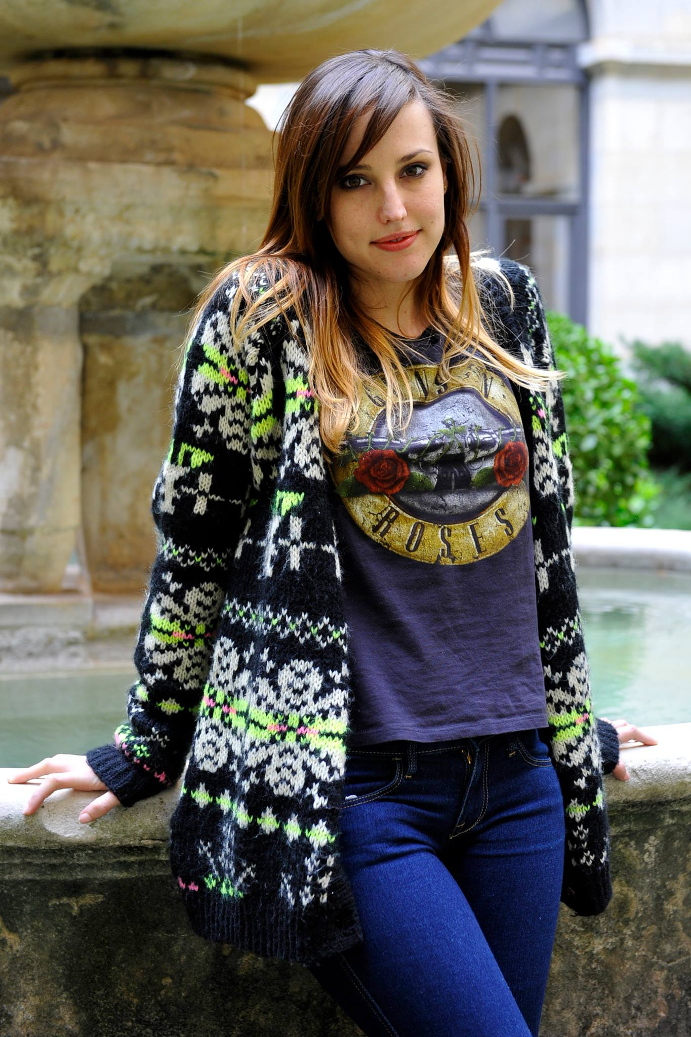 Natalia de Molina en Jaén, su provincia natal, (11-3-2014)